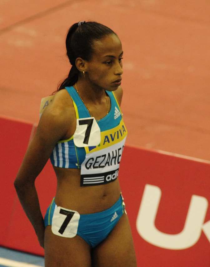 Kalkidan Gazahegh at 2010 Birmingham indoor meeting